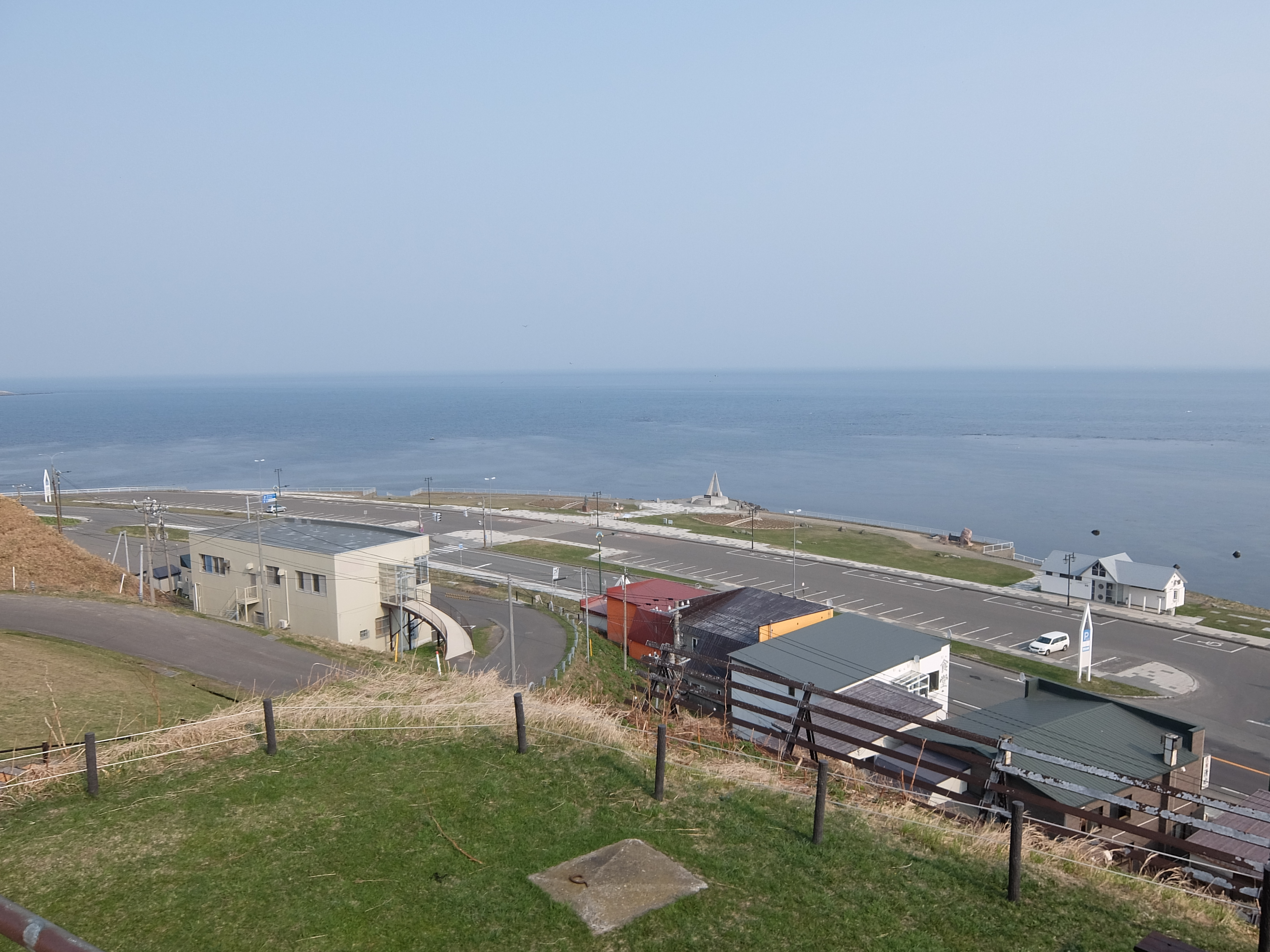 宗谷岬 全景